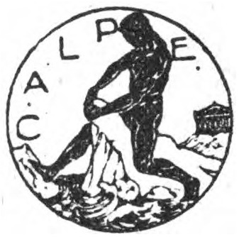 Logo editorial Calpe